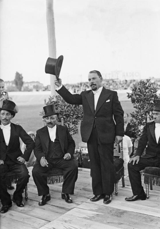 Warschau, Krönung eines "Zigeunerkönigs" Krönung des Zigeunerkönigs Janusz Kwiek auf dem Militärsportplatzin Warschau. 1937. Information added by Wikimedia users.